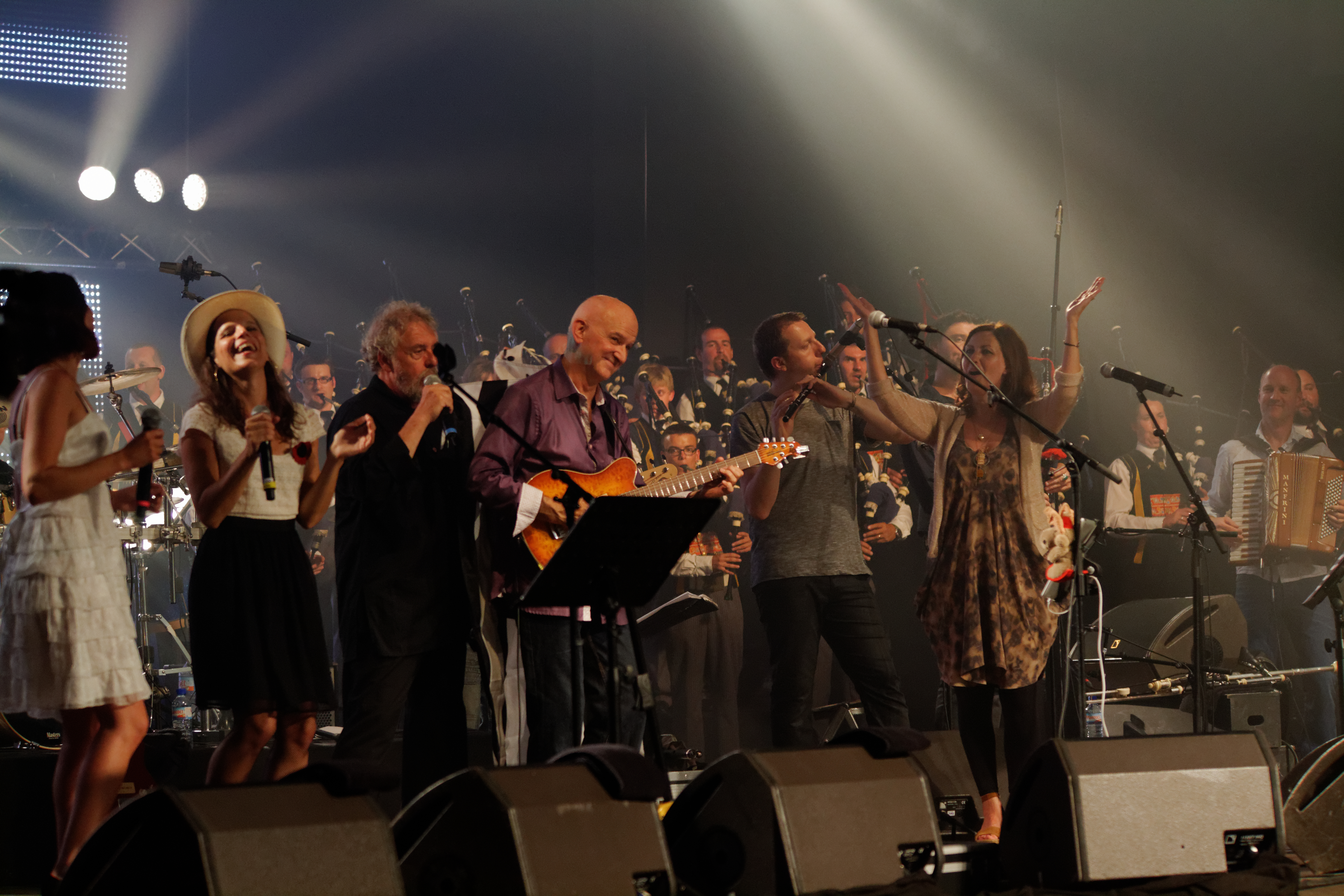 Dan Ar Braz et le bagad Kemper en concert à l'espace Gradlon lors du festival de Cornouaille 2013, à l’occasion des 90 ans du Cornouaille et des 20 ans de la création de l’Héritage des Celtes.